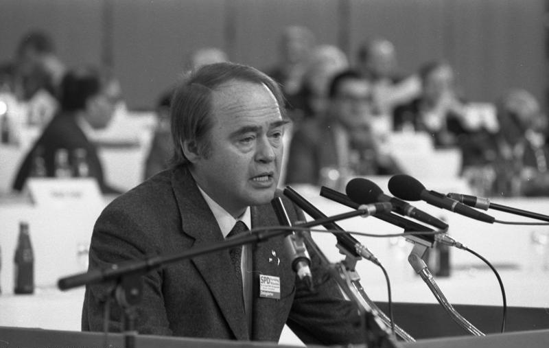 SPD-Parteitag in der Olympiahalle in München